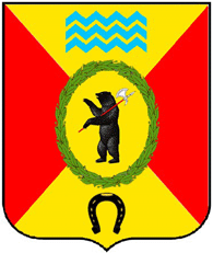 Герб Большесельского района